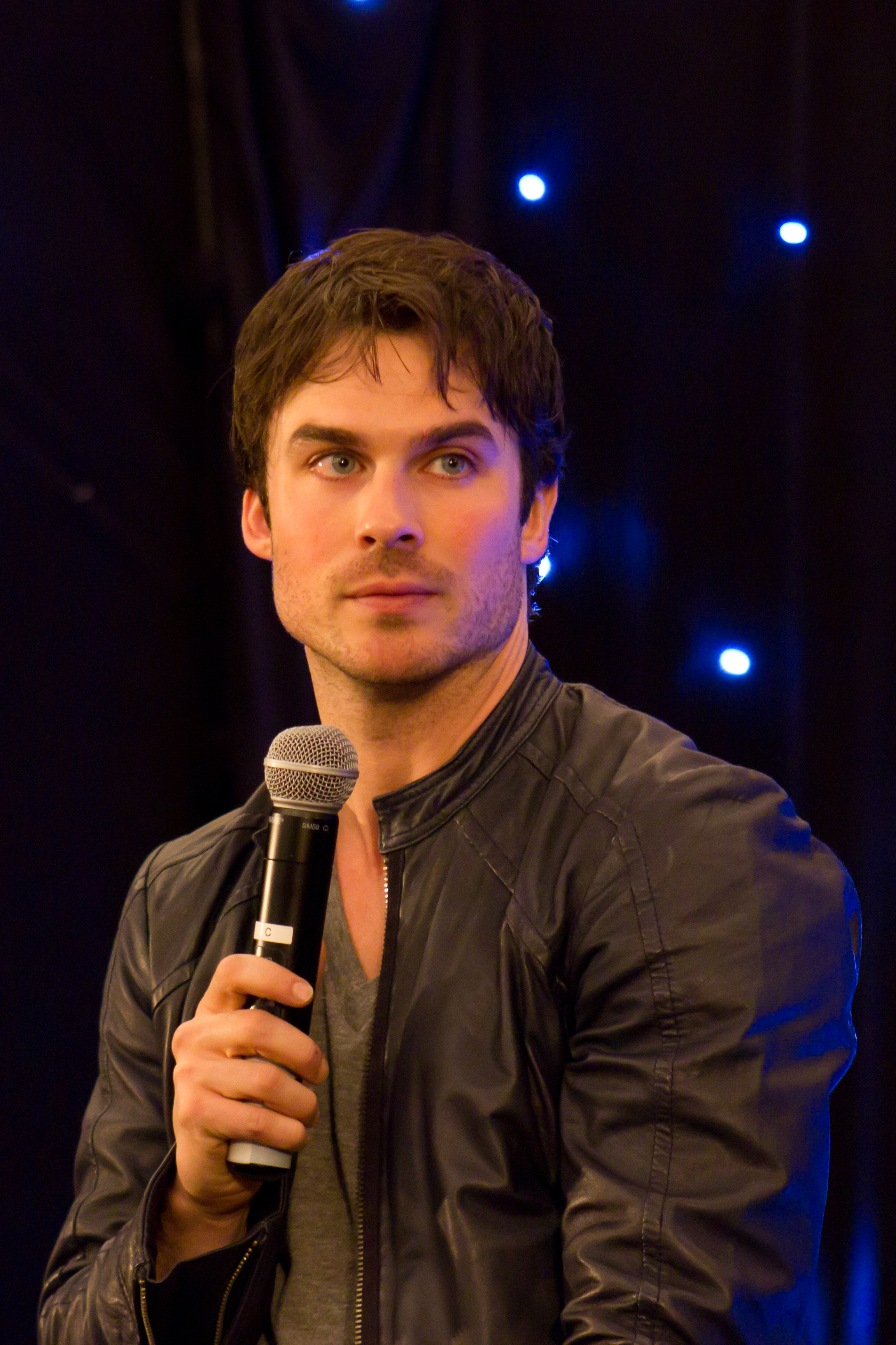 Ian Somerhalder